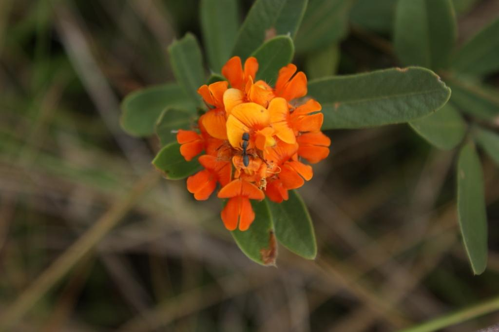 Eriosema glaziovii - FABACEAE Parque Nacional da Chapada dos Veadeiros -Goiás - Brasil.